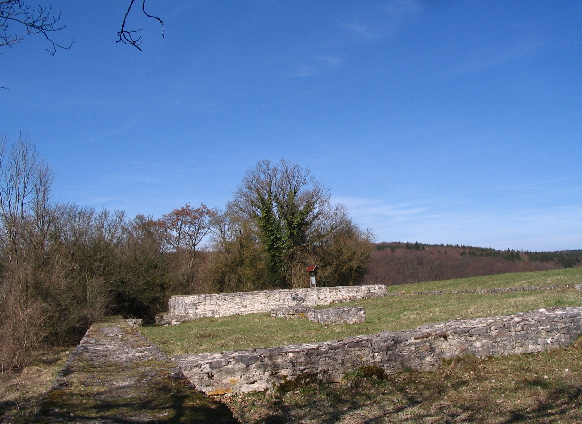 Die heute archäologisch umstrittenen Baureste, die ursprünglich von Konrad Spindler als Kleinkastell Weltenburg-Frauenberg angesprochen wurden, befindet sich auf dem Arzberg oberhalb des Kloster Weltenburg, Landkreis Kelheim, Niederbayern